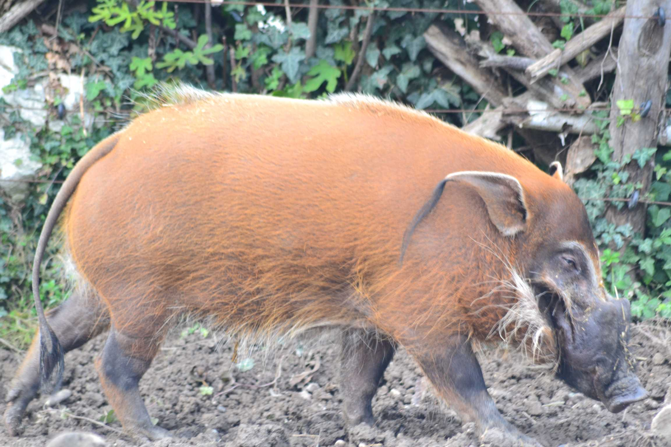 سرخ دریائی خنزیر